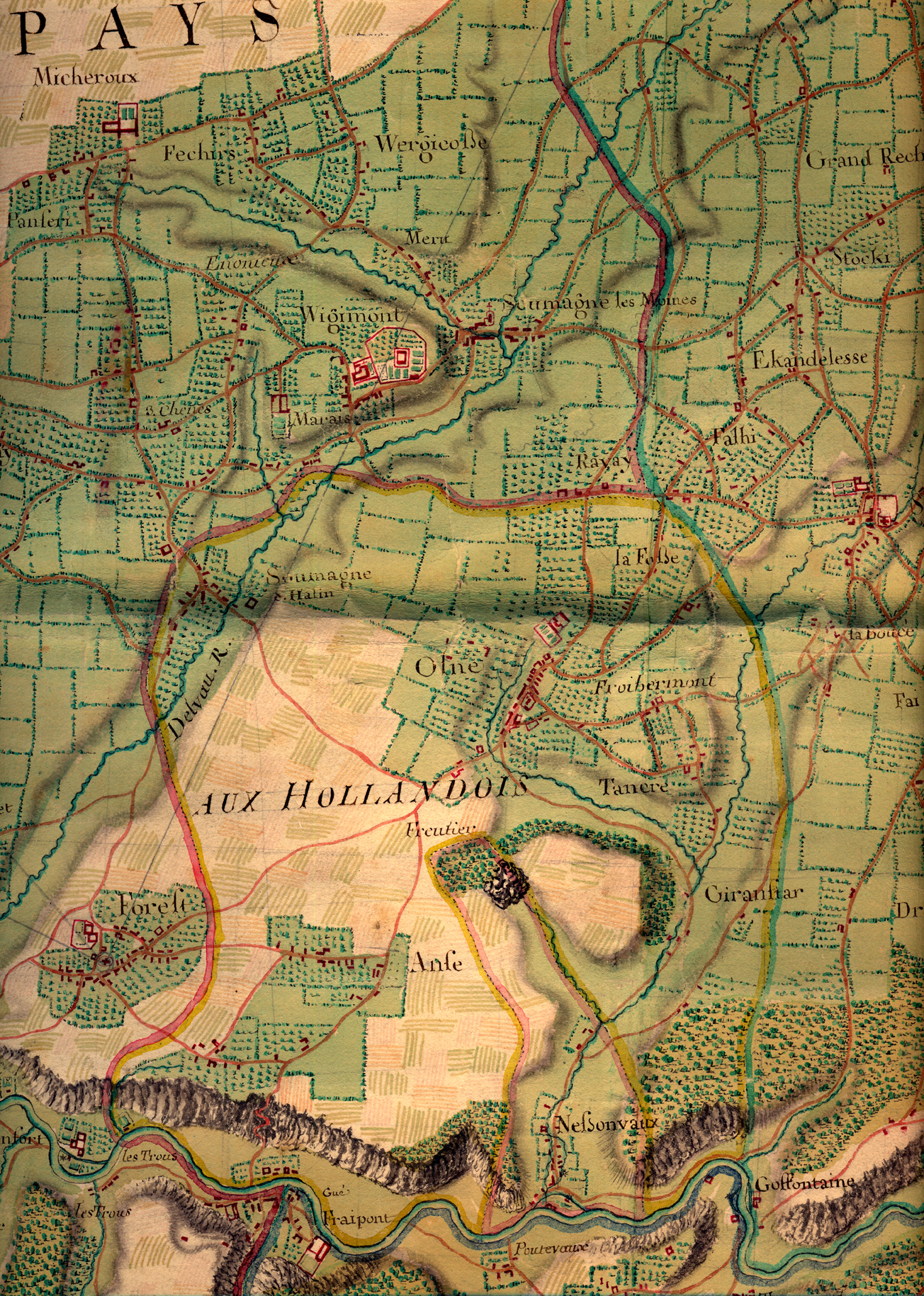 Carte manuscrite du pays d'Olne, rive droite de la vallée de la Vesdre par les ingénieurs géographes français, avec la collaboration de César-François Cassini.